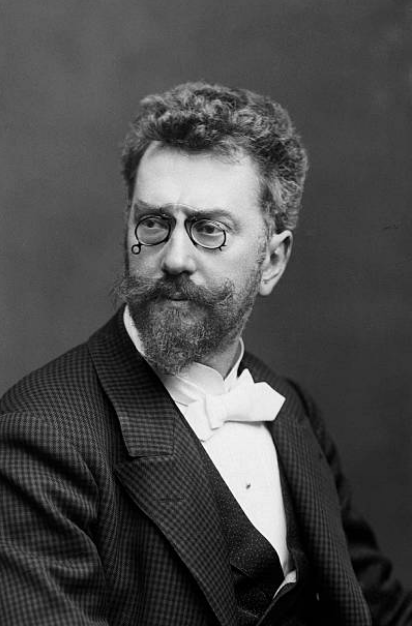 Photographie des Malers Hanns Fechner von seinem Vater Wilhelm Fechner, ca. 1900